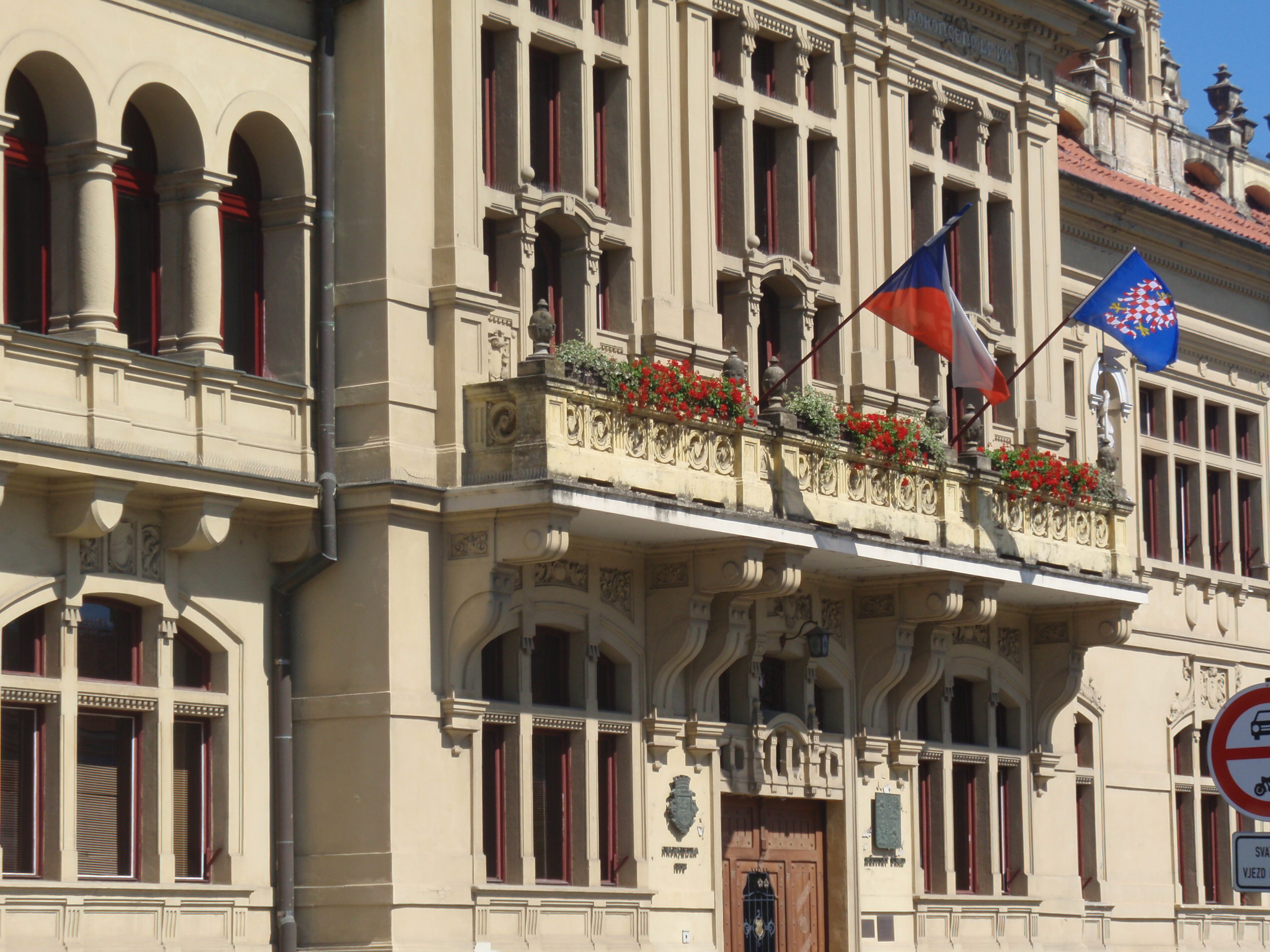 Městský úřad v Napajedlích 5. července 2020 - moravská vlajka vyvěšena společně s vlajkou České republiky